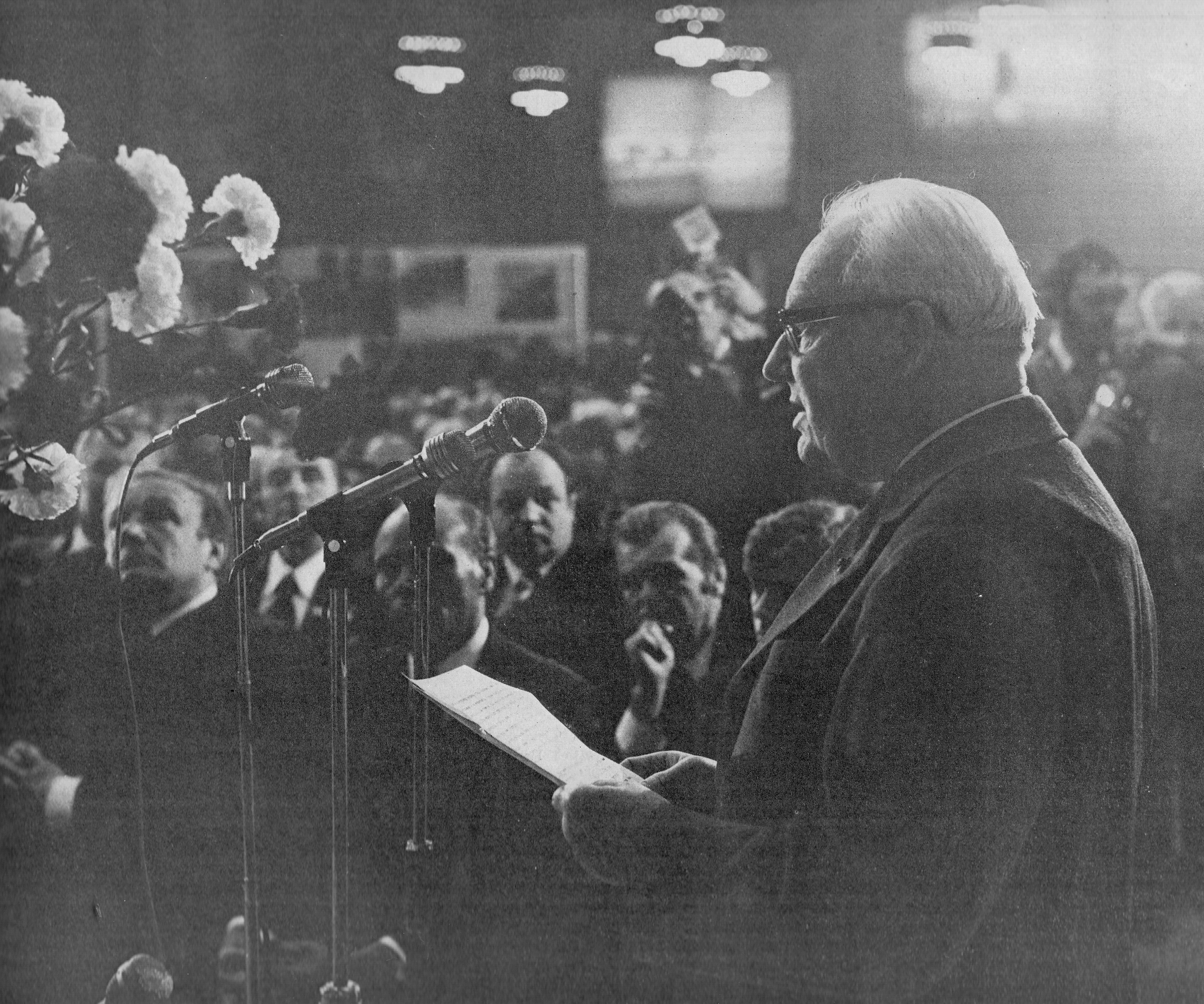 Przewodniczący Rady Państwa Henryk Jabłoński podczas uroczystego posiedzenia Obywatelskiego Komitetu Odbudowy Zamku Królewskiego w Warszawie